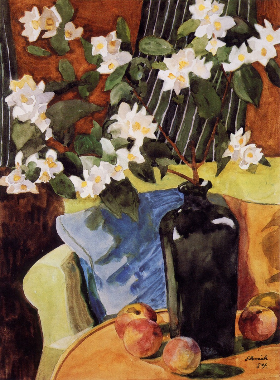 Otto Ehrich Aquarell 1984